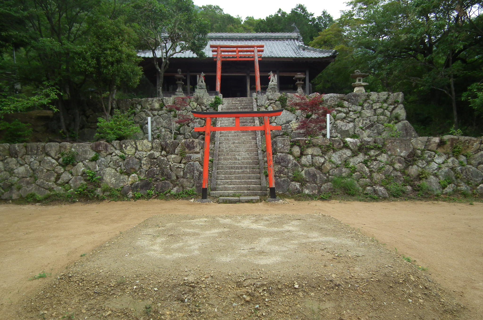 Oka-Inari 岡稲荷神社 鳥居